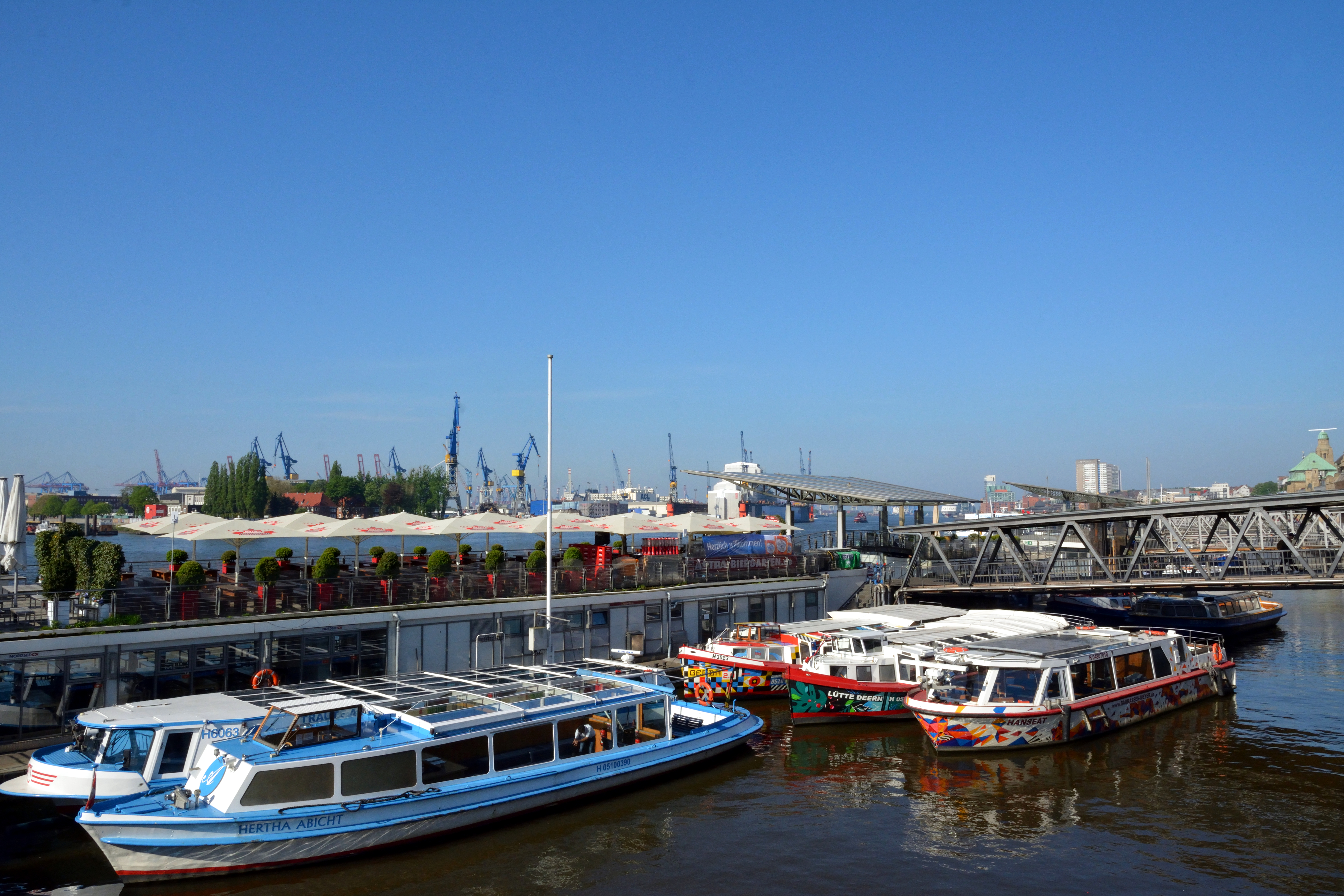 Impressionen eines Wochenendes in Hamburg mit dem Titel: Wikipedia:Ahoi Fotos der Barkassenfahrt am Samstag im Hamburger Hafen.